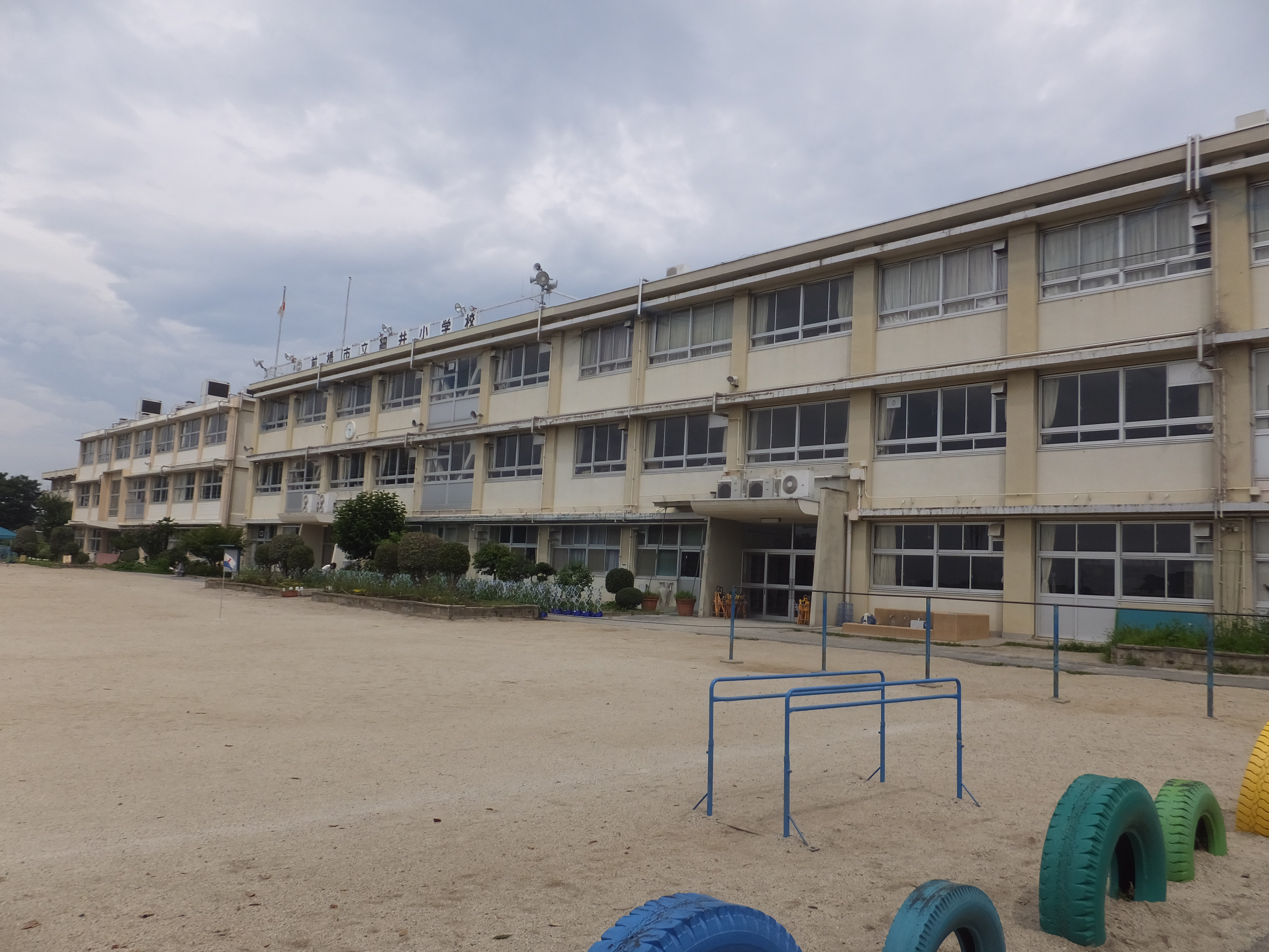 前橋市立細井小学校の外観。学校の敷地の校庭から許可を得て撮影